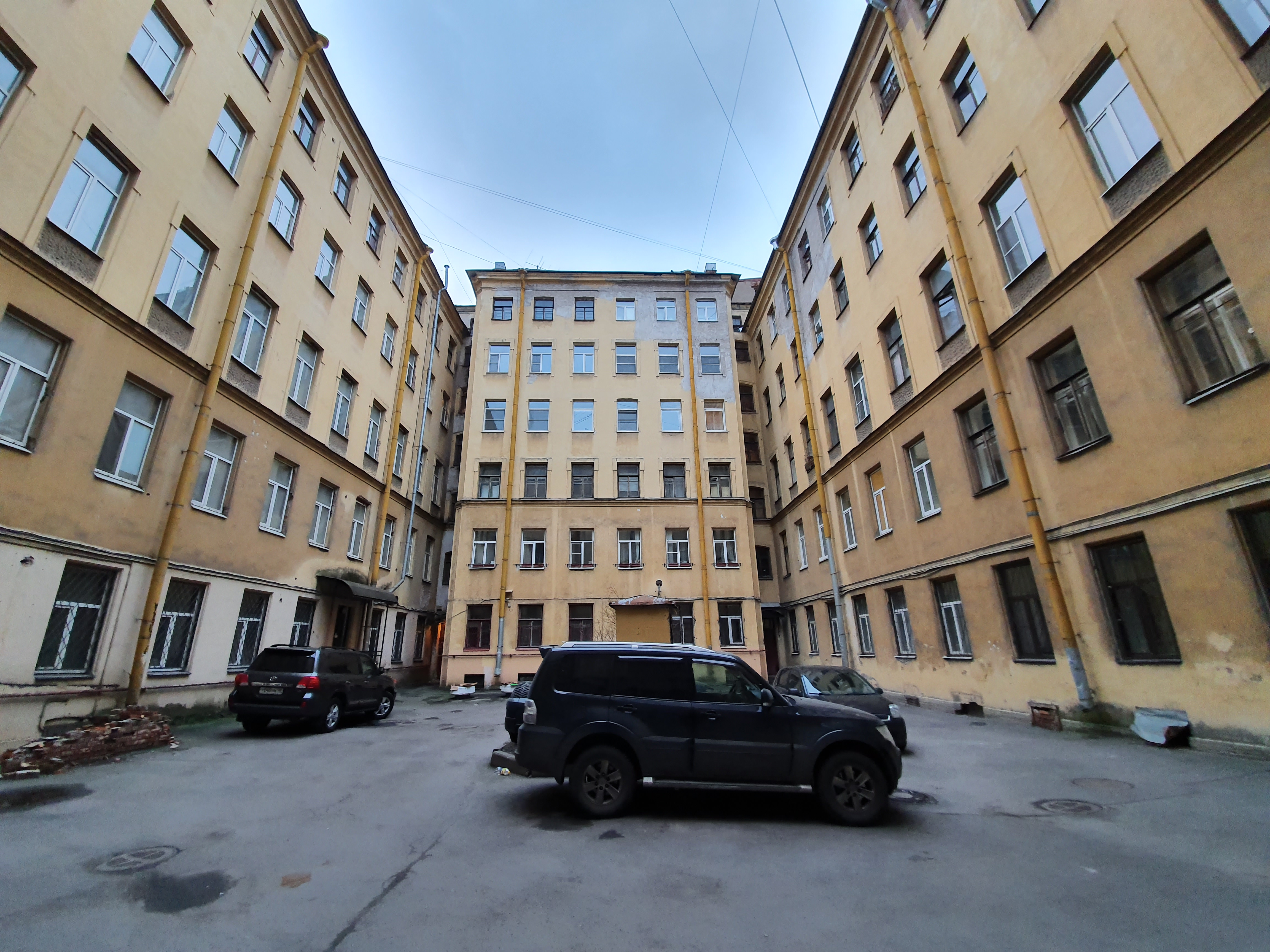 Дом А. Я. Барышникова в Санкт-Петербурге по адресу ул. Марата, 31. Арх-р А. А. Барышников, 1897-1899.